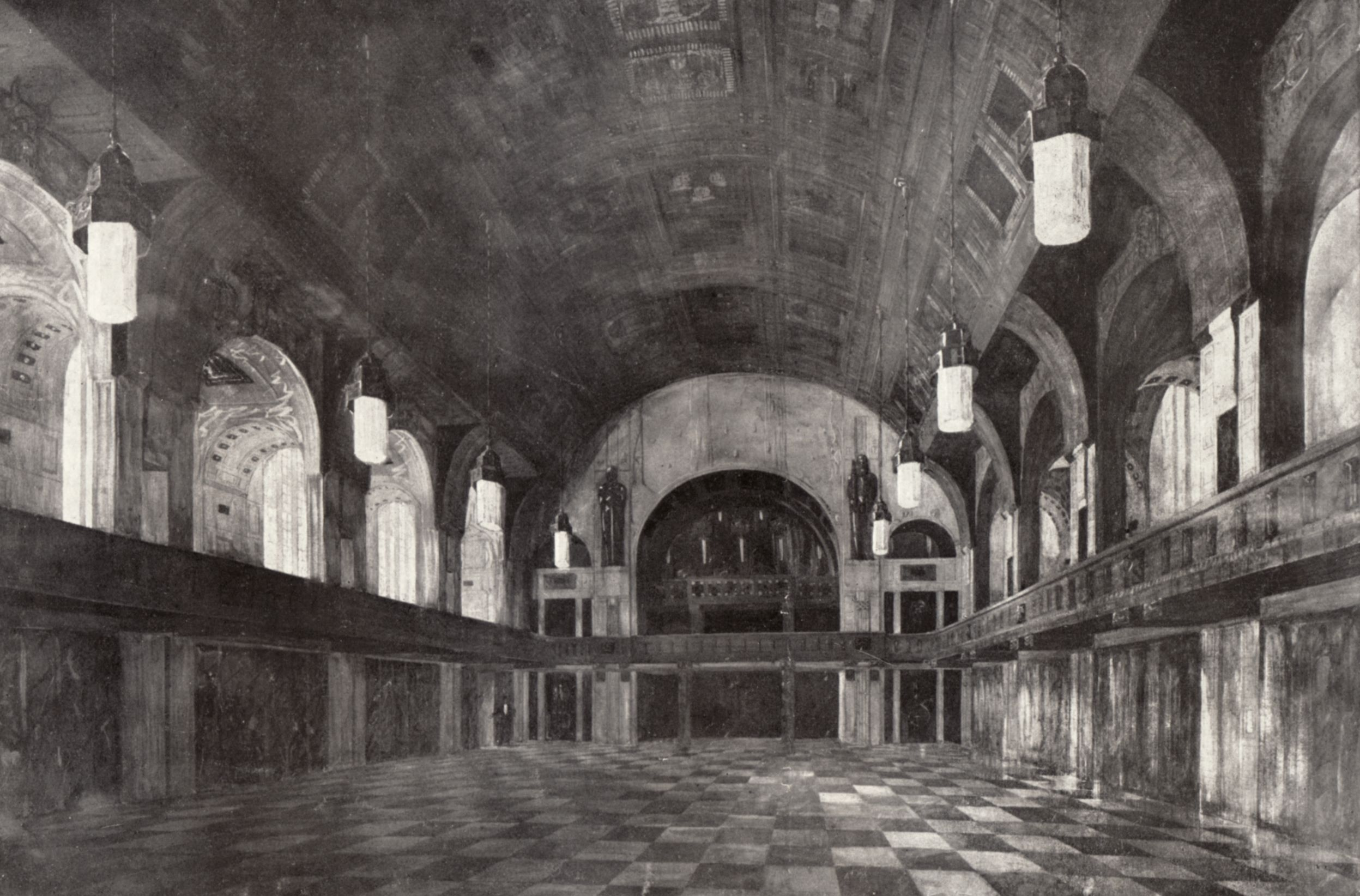 Berlin - Weinhaus Rheingold, Entwurf von Bruno Schmitz